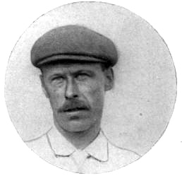 Laurie Auchterlonie, the U.S. Open champion in 1902.